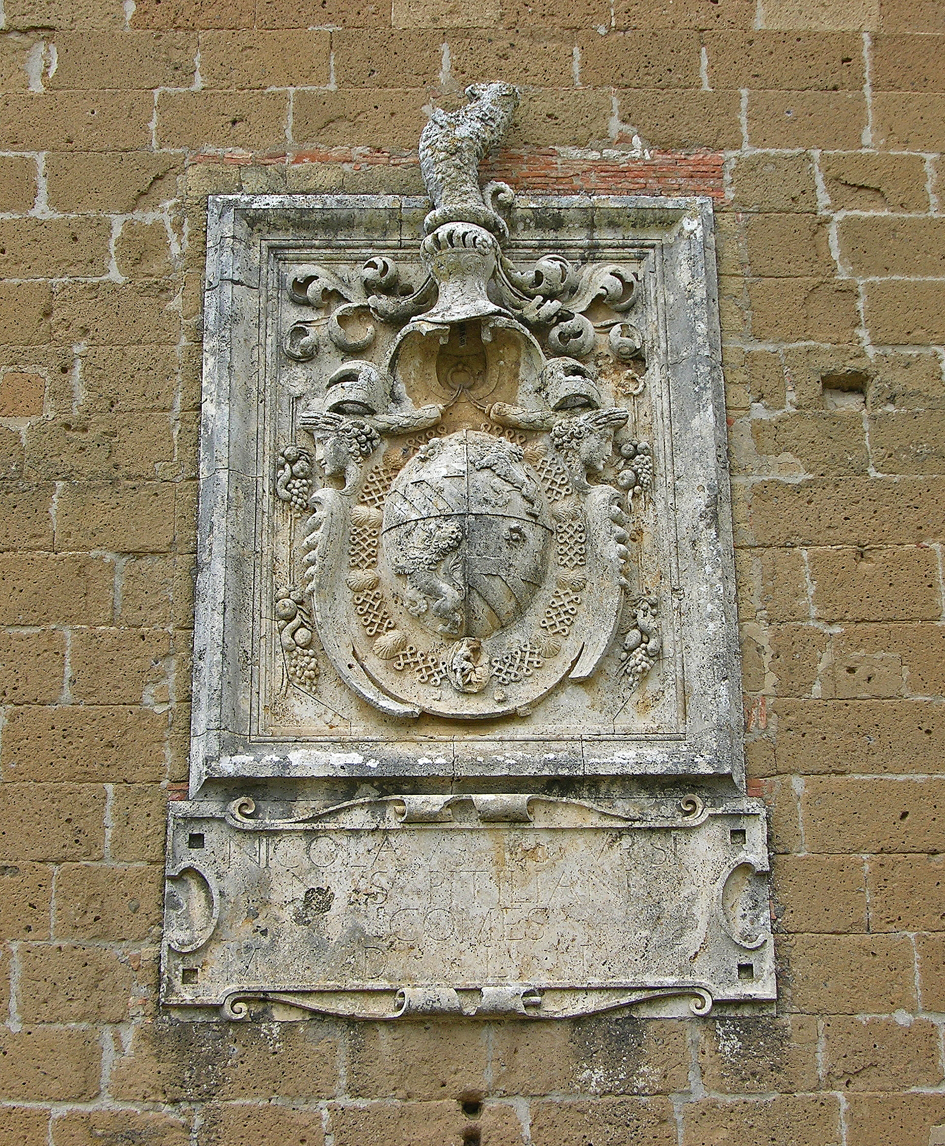 Particolare dello Stemma della Fortezza Orsini di Sorano (GR)